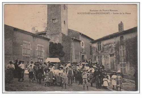 Sortie de messe à l'église de la Nativité-de-la-Vierge de Bouxières vers 1912.